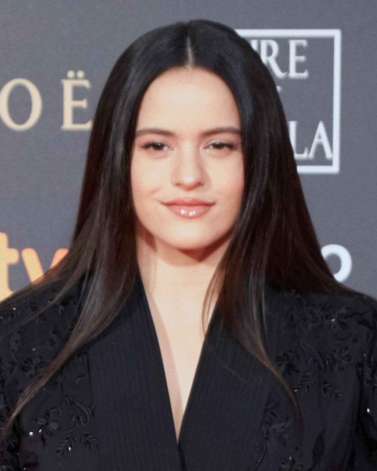 Rosalía en la alfombra roja de los Premios Goya celebrados en Sevilla en Febrero 2019